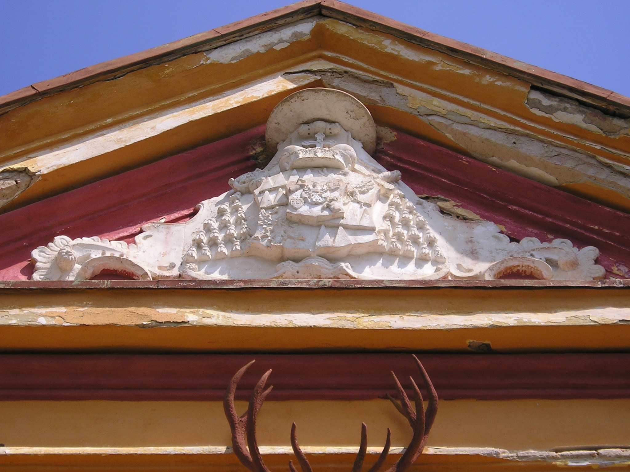 Znak Ferdinanda Julia Troyera z Troyersteinu na průčelí zámku Ferdinandsko